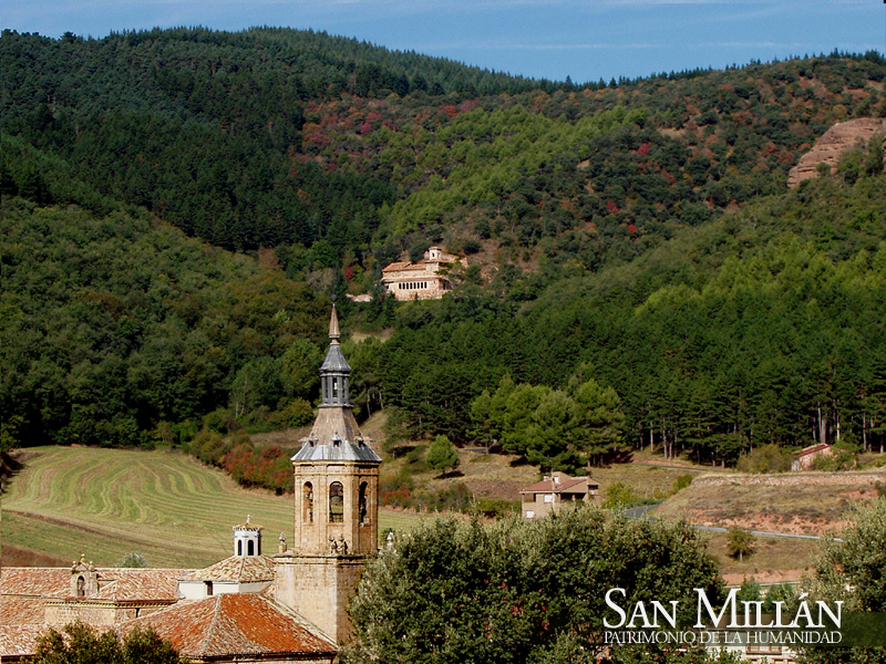 Monasterios de San Millan. Suso y Yuso. Patrimonio de la Humanidad